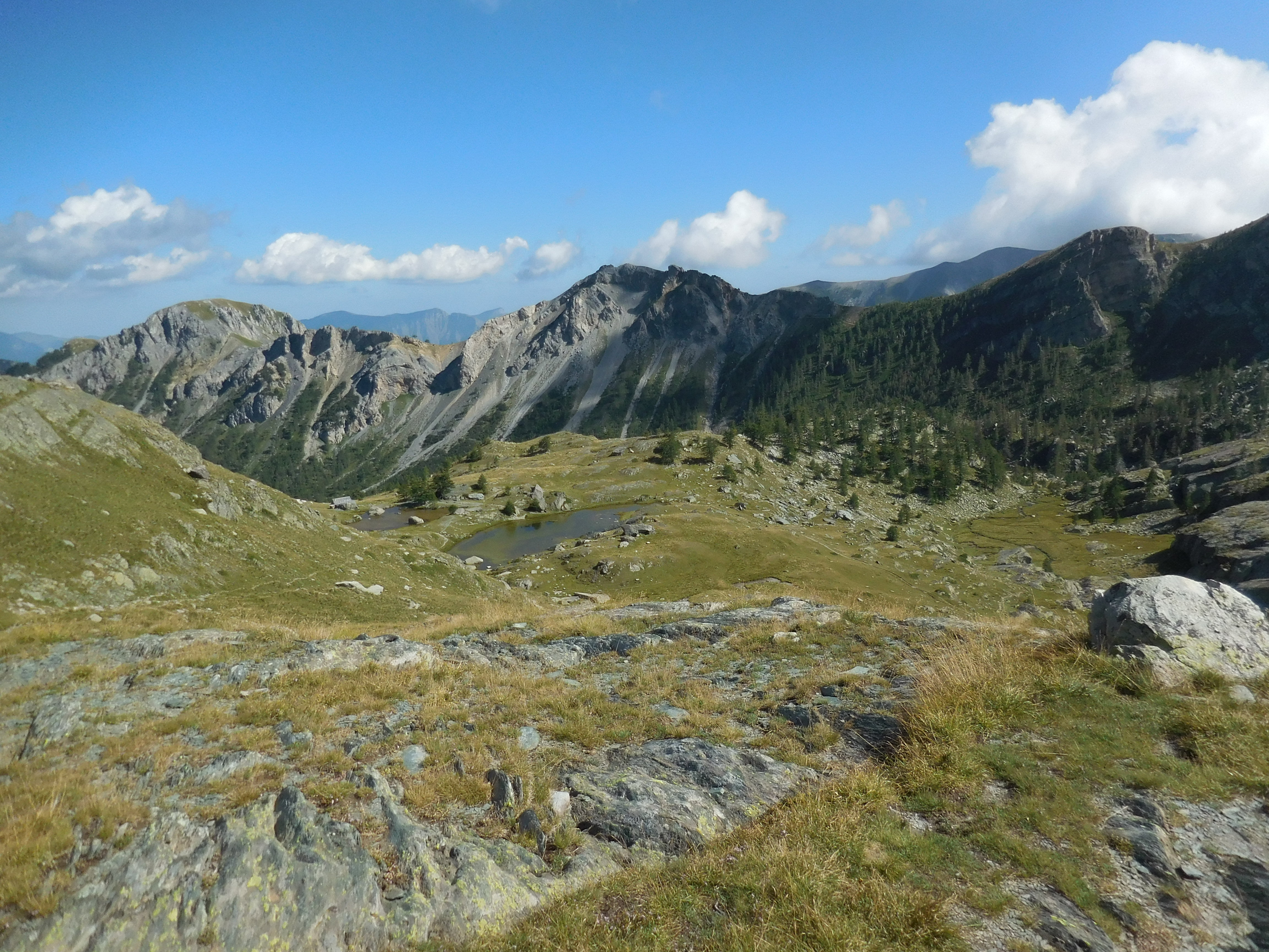 Les lacs Jumeaux. Derrière le vallon de Fontanalba, à gauche le rocher Rouge et au milieu la cime de Chanvrairée, avec à sa droite la baisse de Vallauretta.